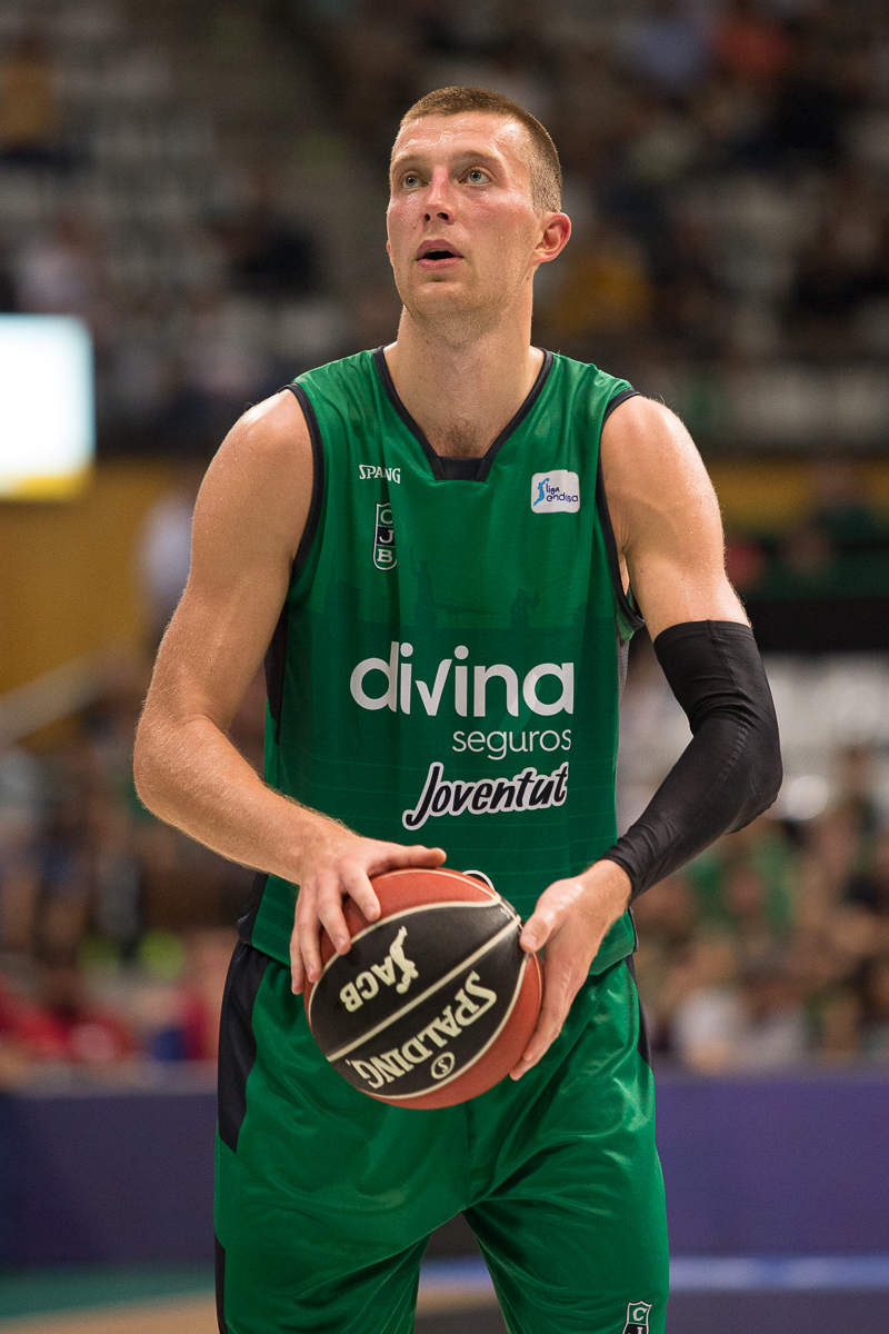 Saulius Kulvietis en un partido de Liga ACB del Club Joventut Badalona de la temporada 2017-18.